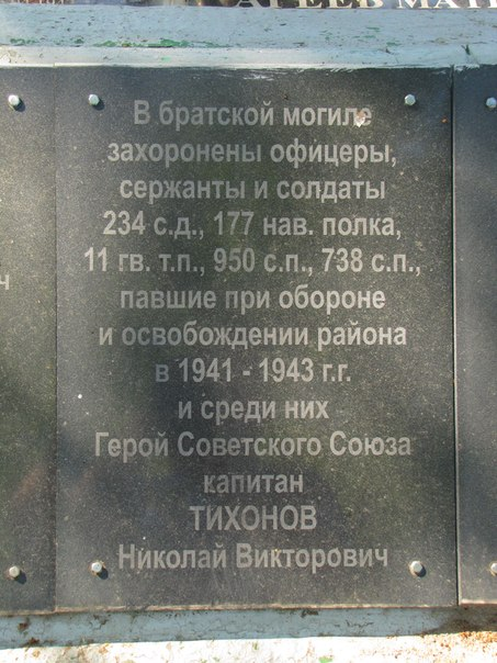 Братская могила в деревне Воронцово Духовщинского района Смоленской области, где похоронен Герой Советского Союза Николай Тихонов - табличка.